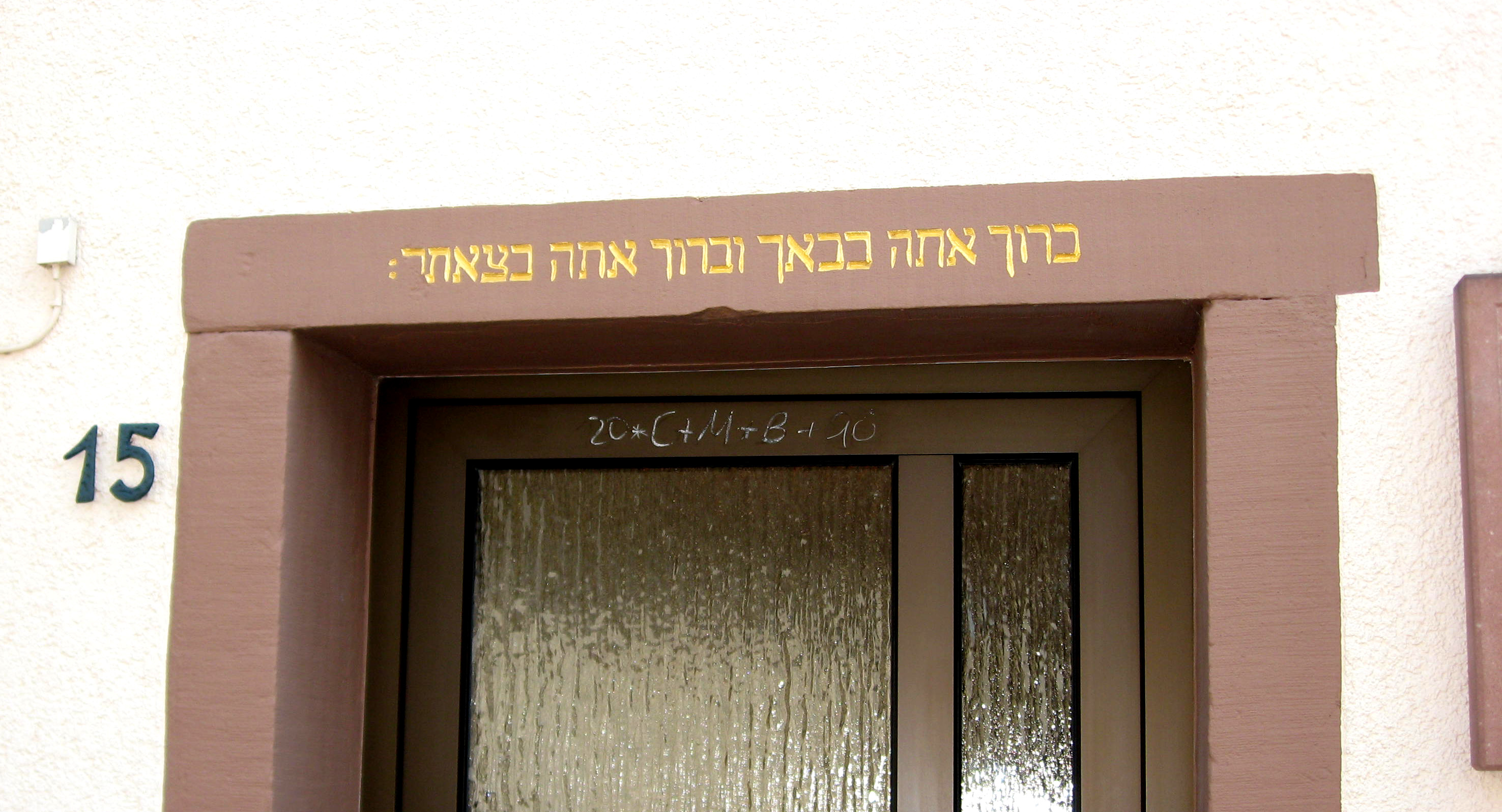 Türsturz Schafstraße 15 in Venningen; hebräischer Haussegen der ehemaligen Synagoge, übersetzt: Du bist gesegnet in deinem Kommen und in deinem Gehen